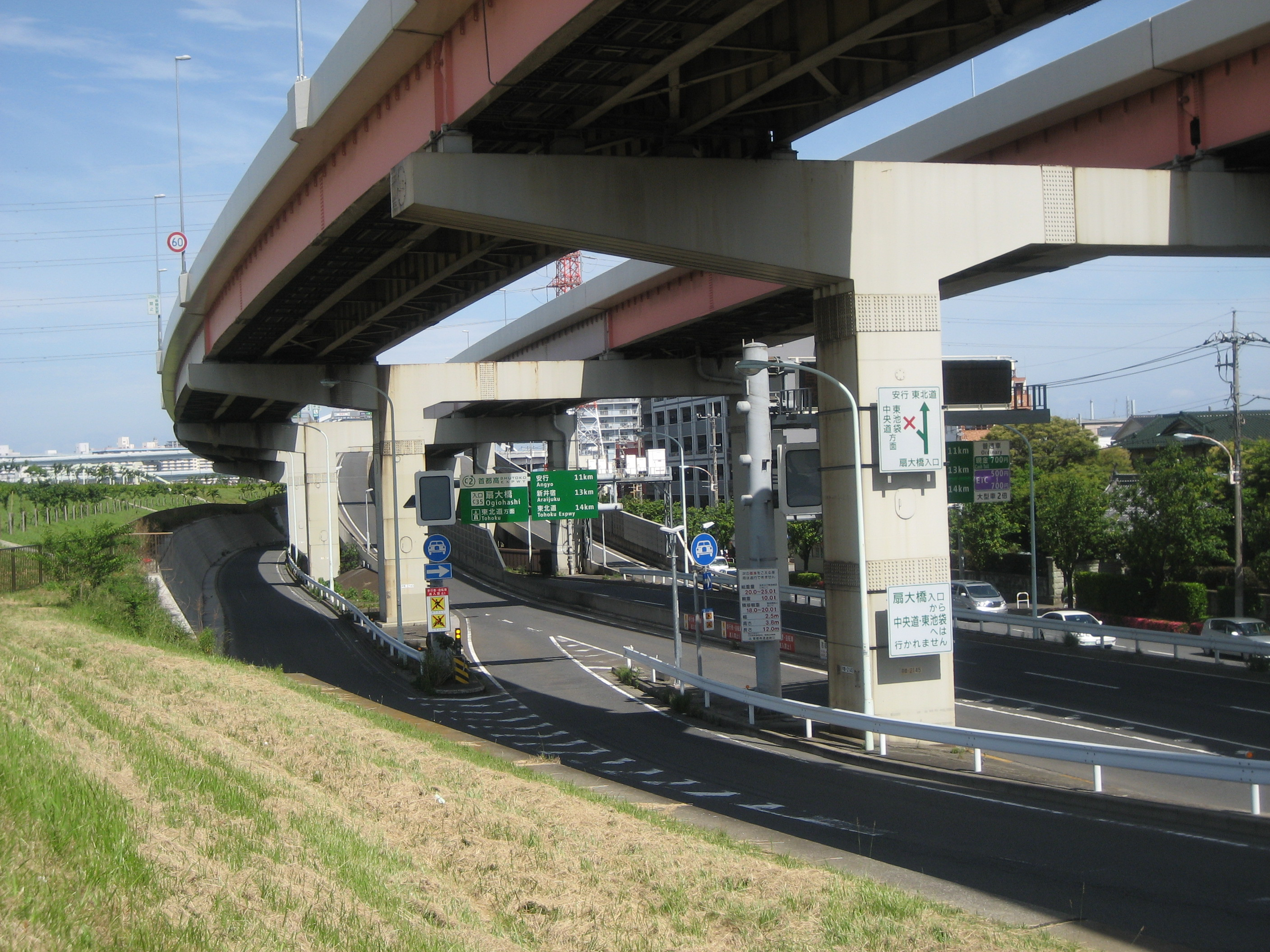 首都高速中央環状線扇大橋入口付近（扇大橋側入口）